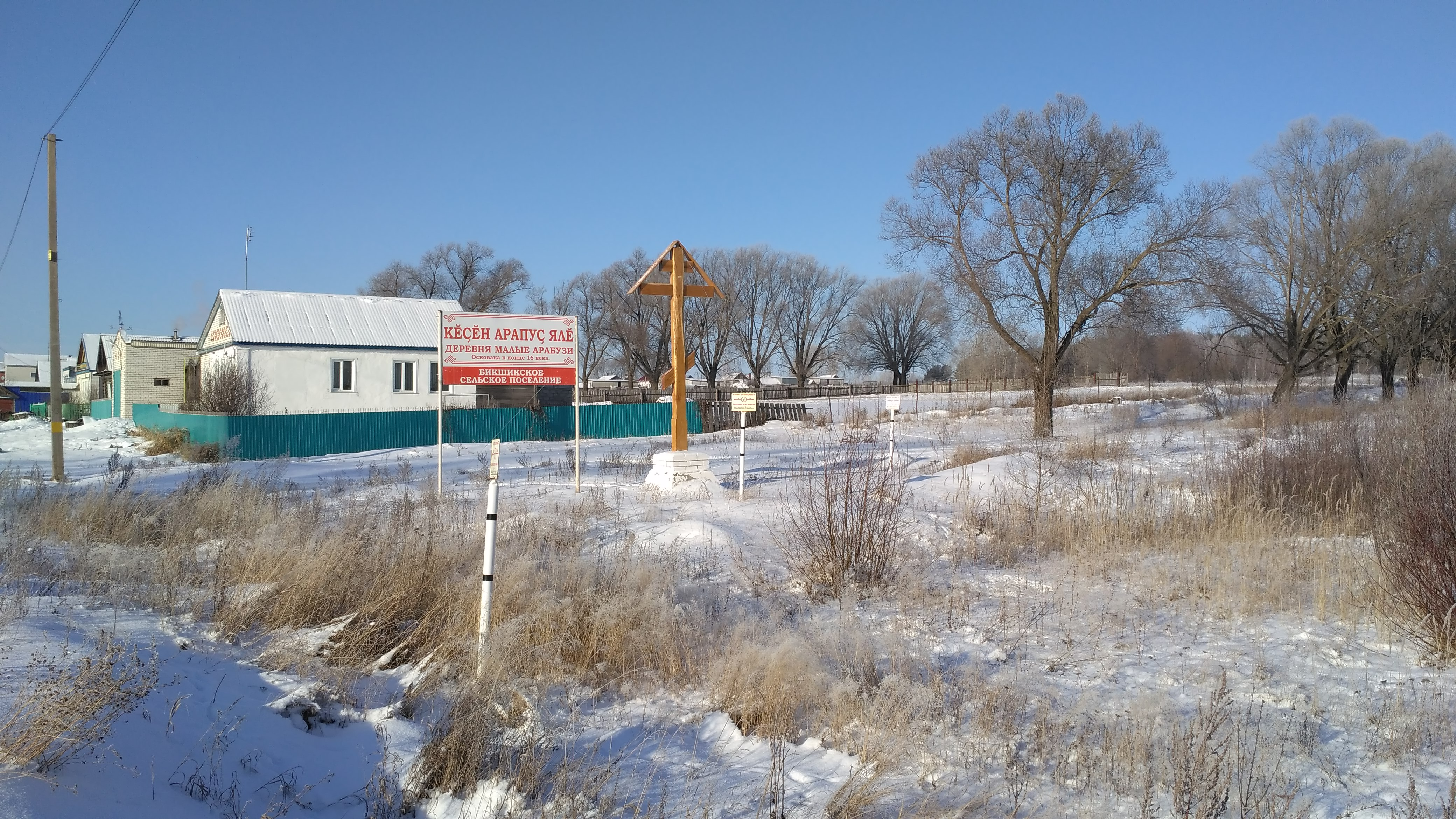 Название при въезде в деревню